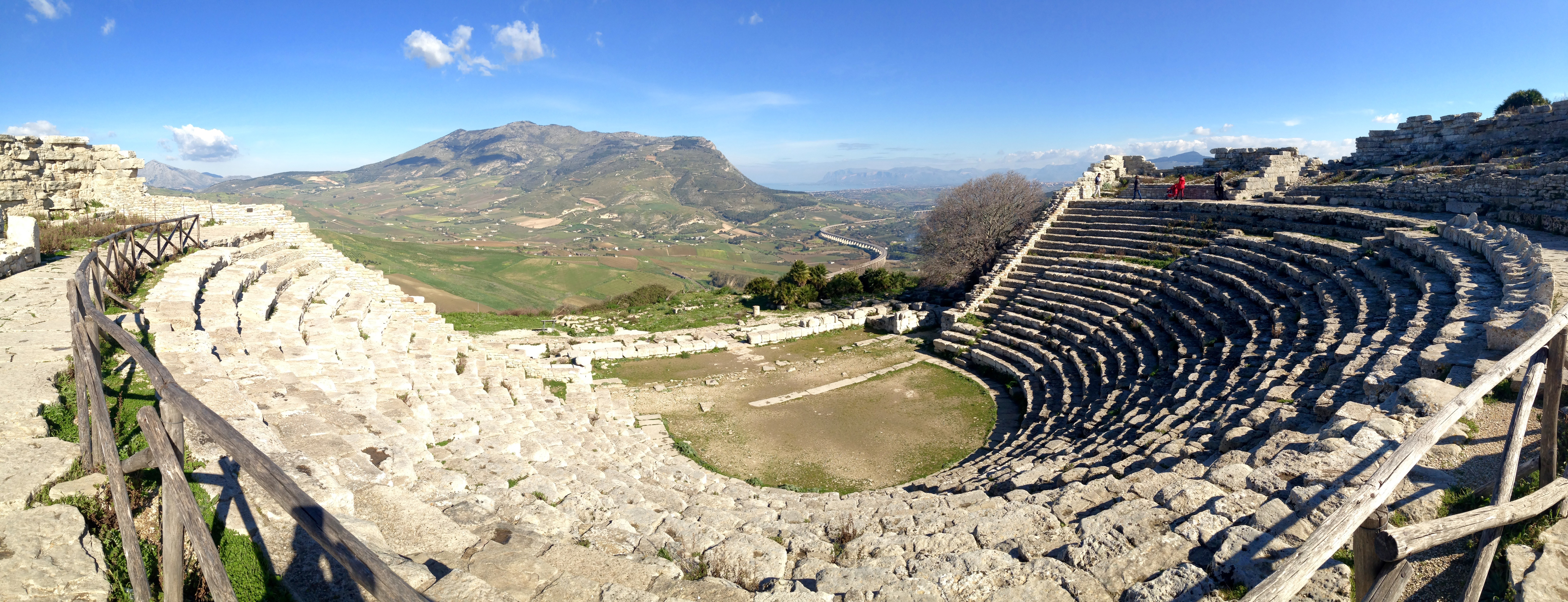 Panorama dal teatro di Segesta